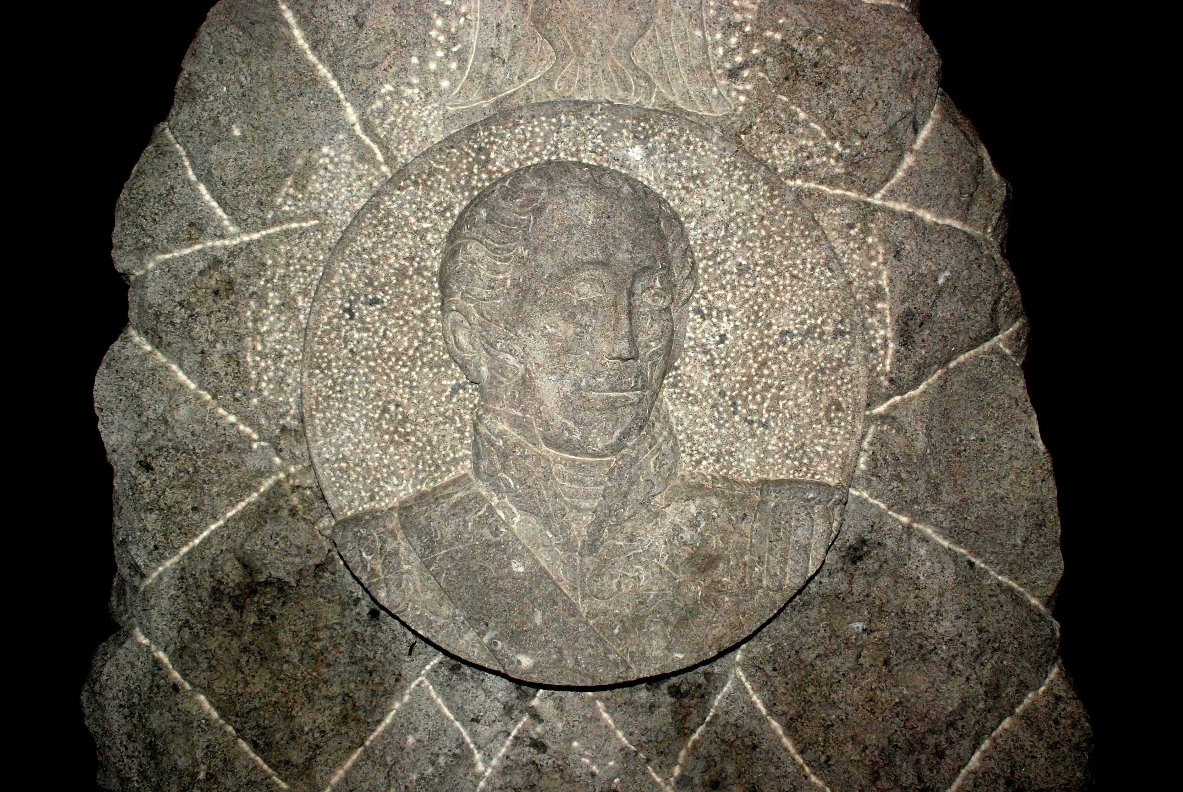 Belgique - Brabant wallon - Wavre - Bierges - Monument au général Gérard (bataille de Wavre, 18 juin 1815)